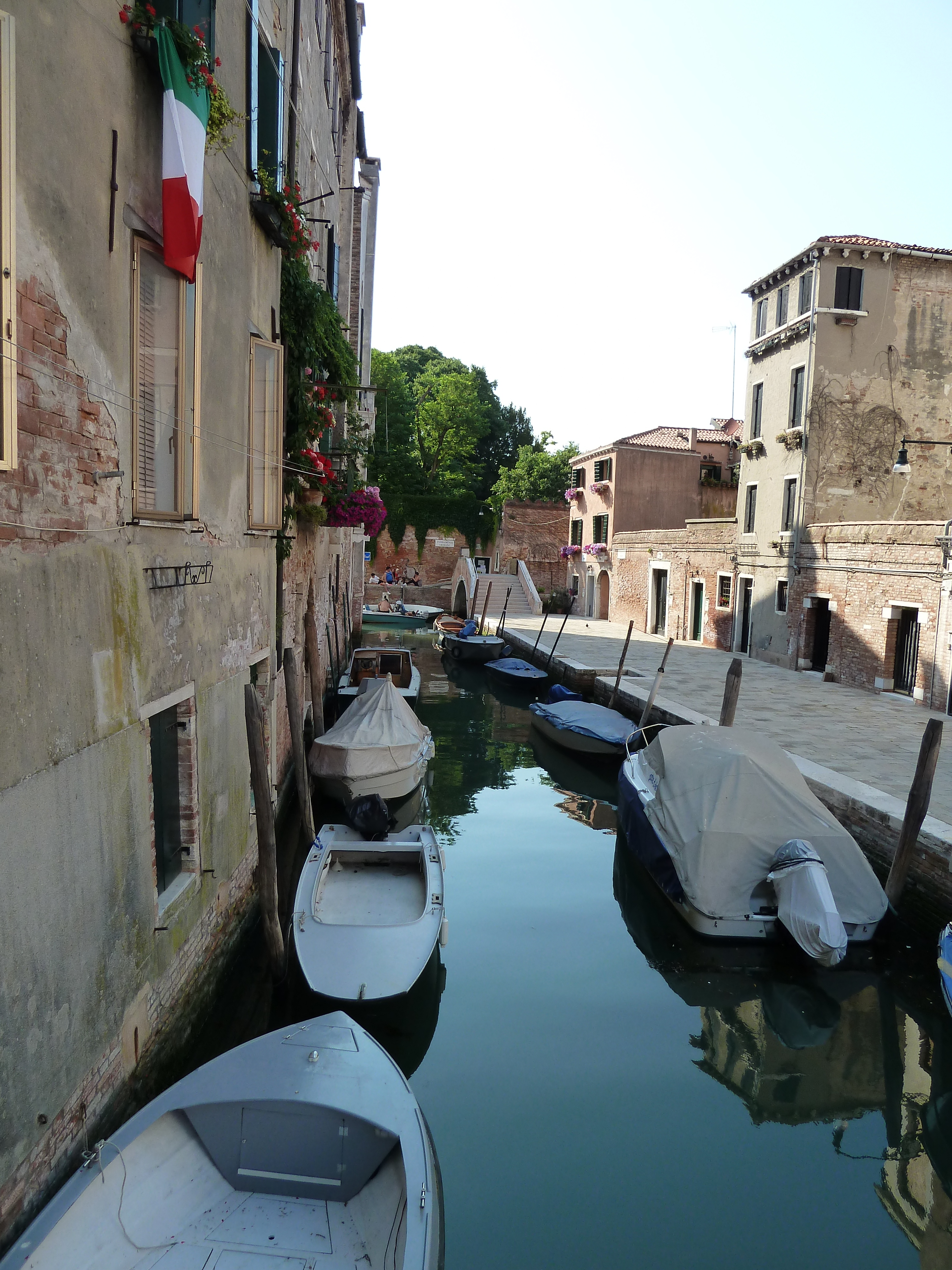 Rio del Trapolin (Venice)